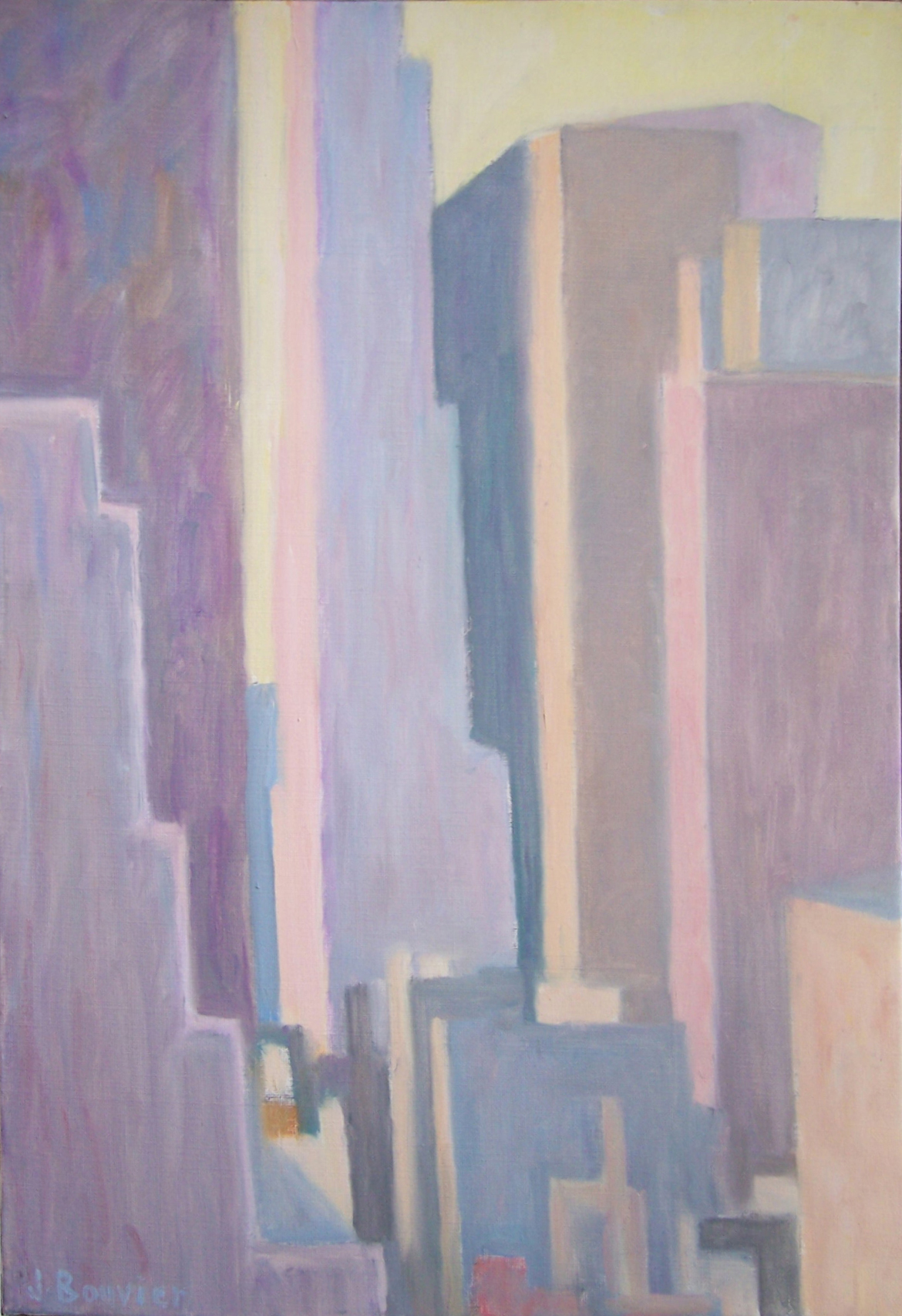 Tableau "New-York 2000" par Jean Bouvier